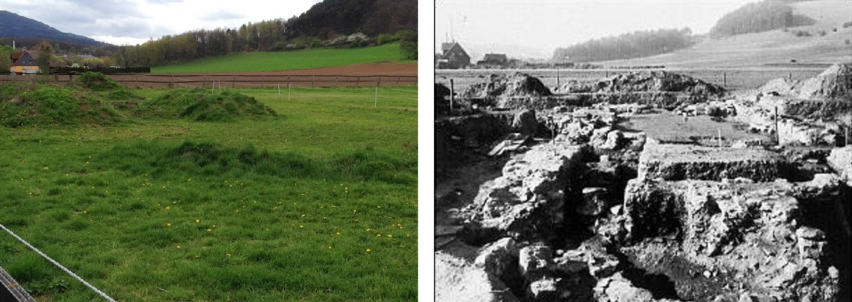 Goslar-Oker, Grabungsfeld Sudburg von Osten, 2017 und 1933